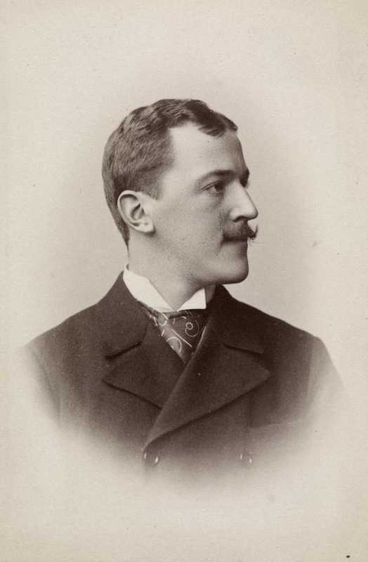 Gade, Herman Gerhard, foto fra 1893. Fotograf: Szacinski, Ludwik de Ravics